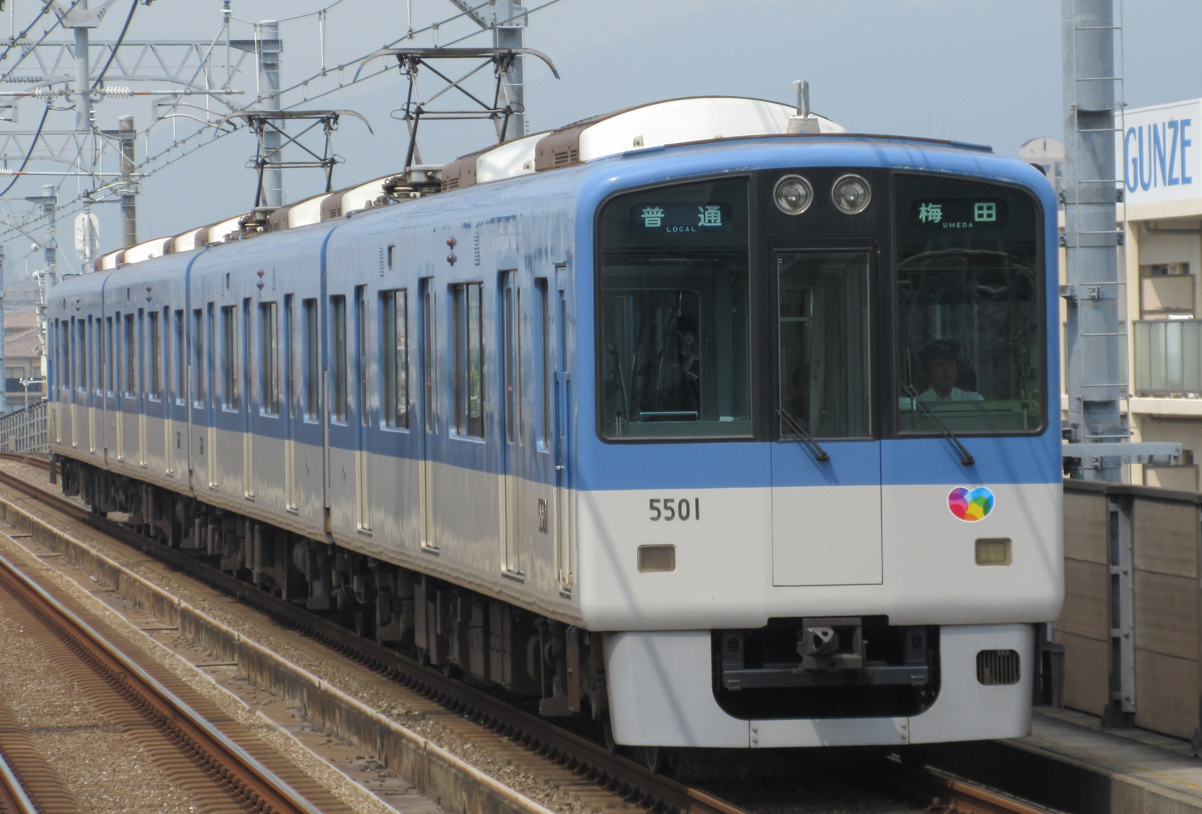 阪神電鉄5501編成 (香櫨園駅にて)